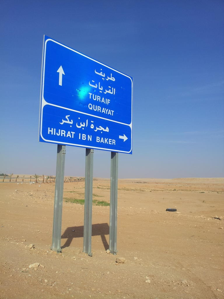 هجرة بن بكر